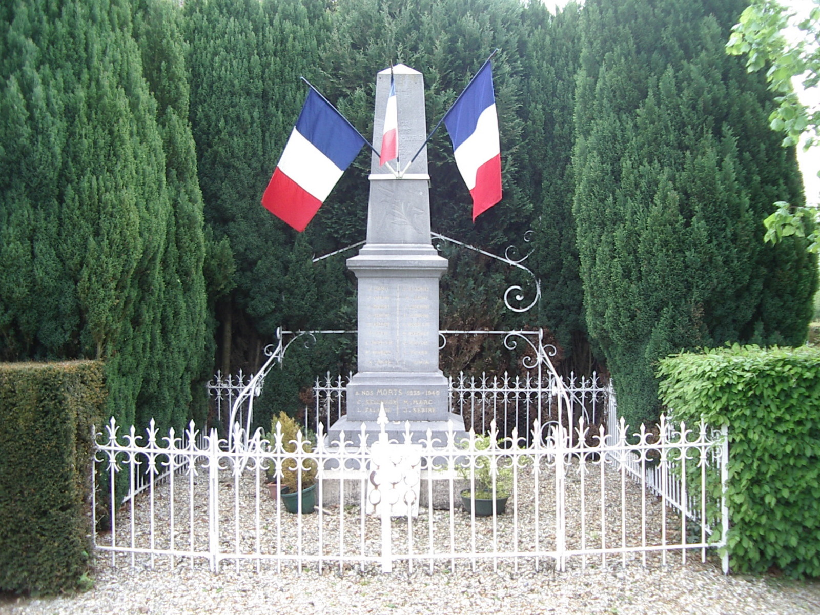 Monument aux morts de La Roussière (France, Eure)